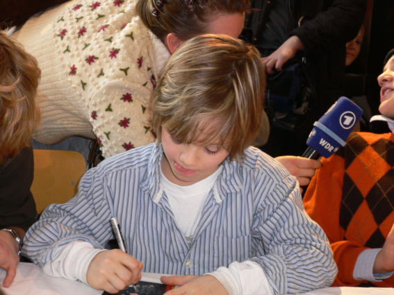 Nick Romeo Reimann, WK3 Kinotour 2006